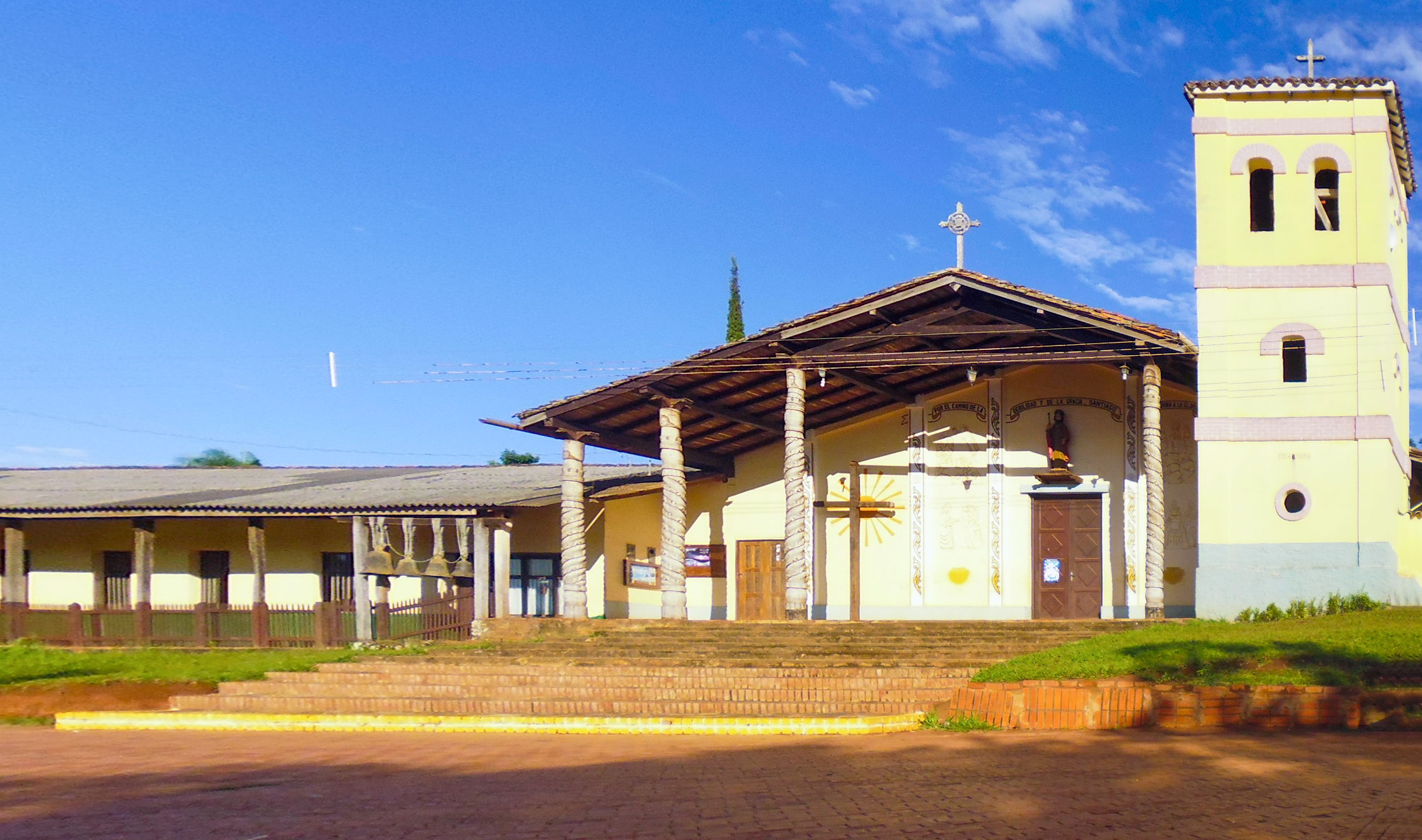 La iglesia de Santiago de Chiquitos patrimonio cultural de la Chiquitanía Boliviana.